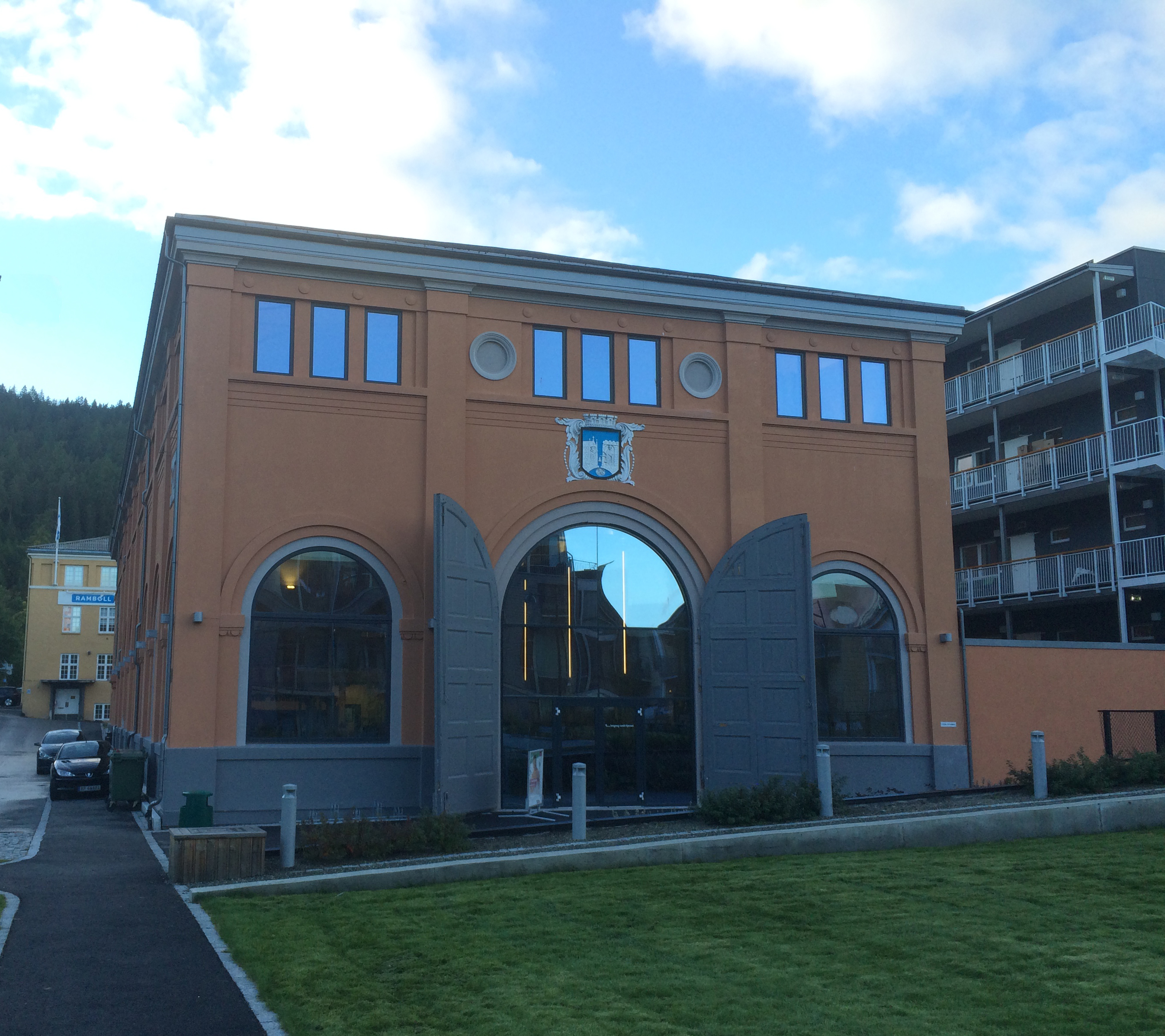 Bygningen er rehabilitert av Agraff arkitektur. Den fikk "hederlig omtale" ved utdeling av Trondheim kommunes byggeskikkpris 2016